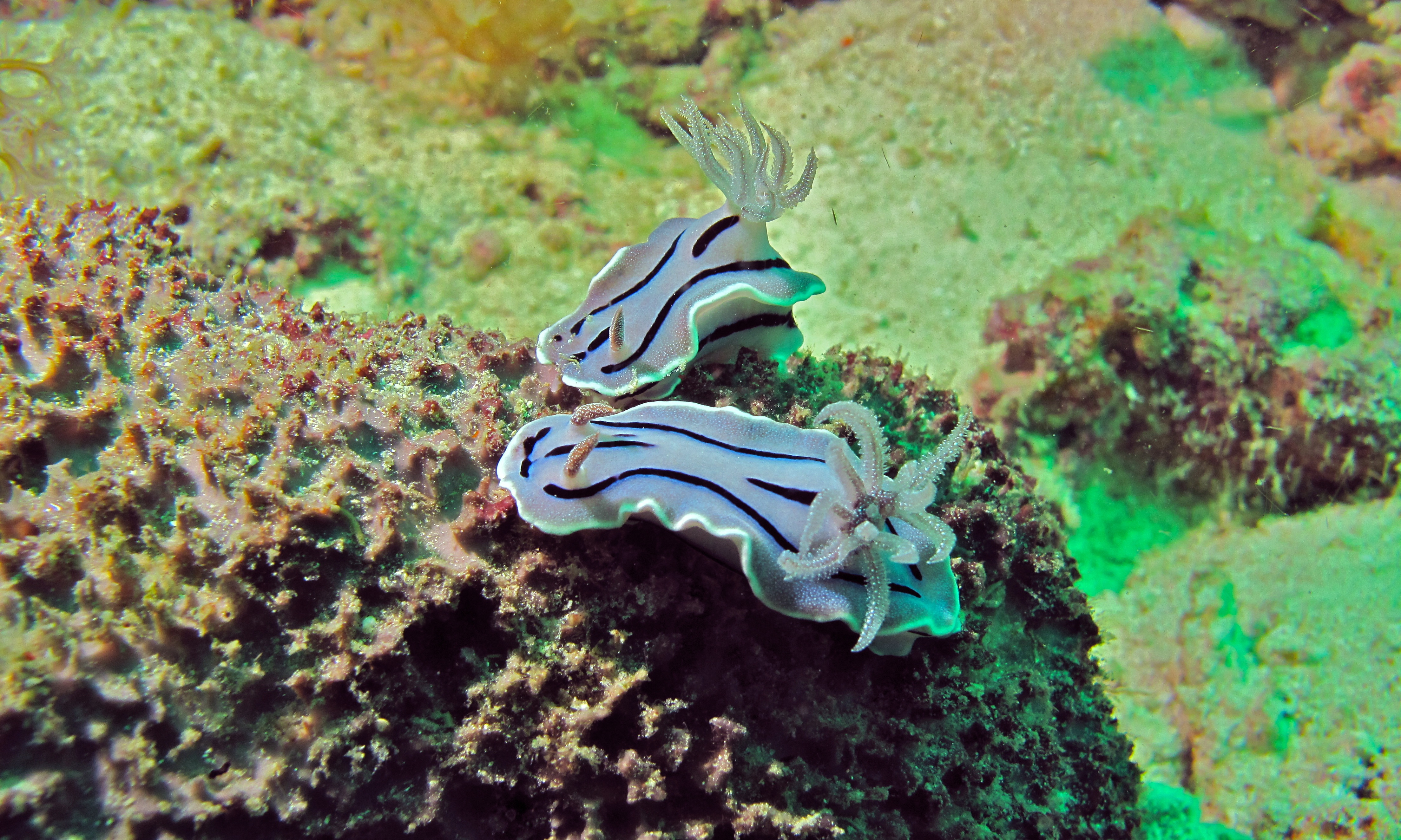 Left Shoulder, Pulau Sibuan, Sabah, MALAYSIA